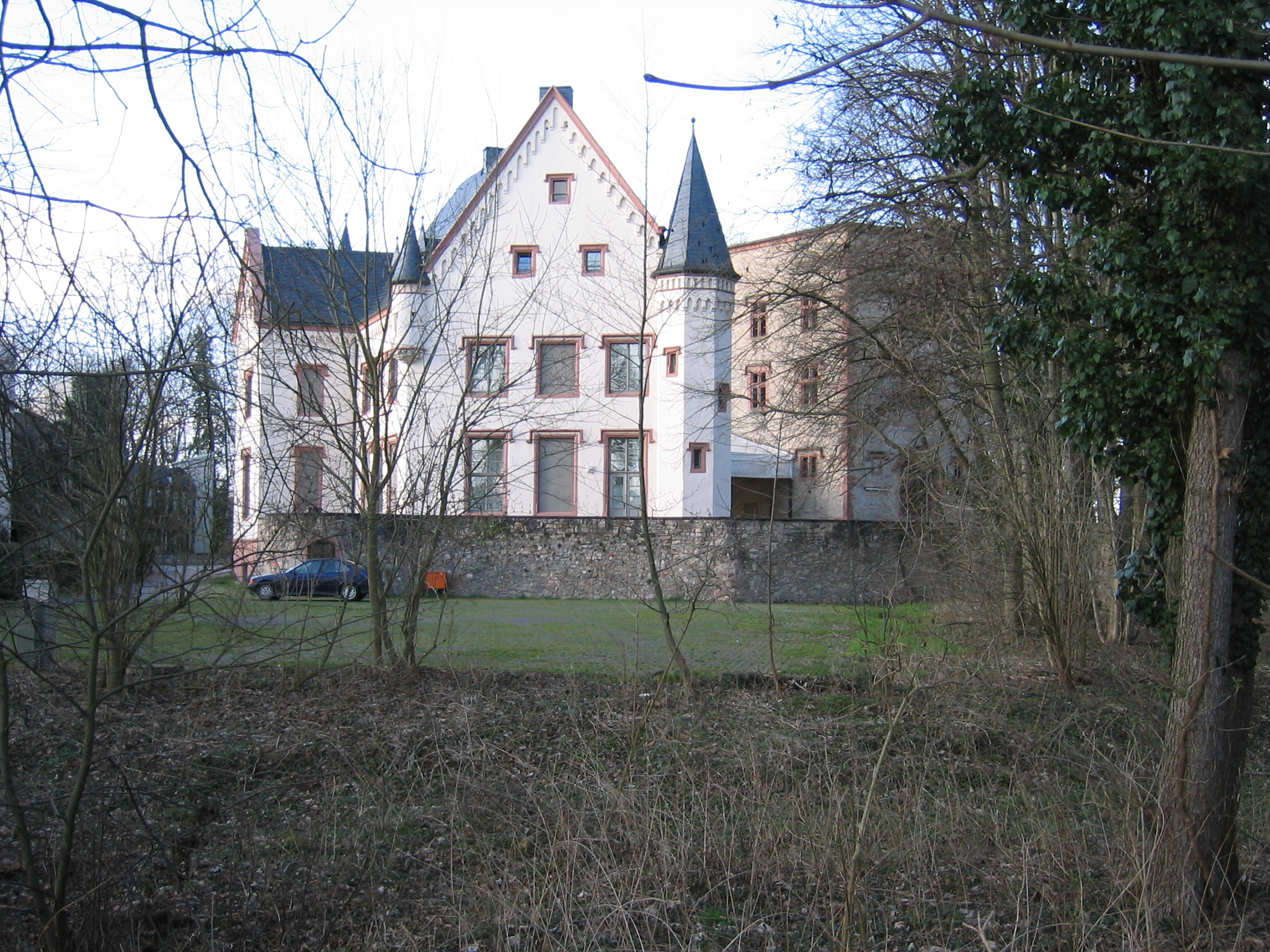 Heusenstamm, Altes Schloss / Hinteres Schlösschen und Bannturm